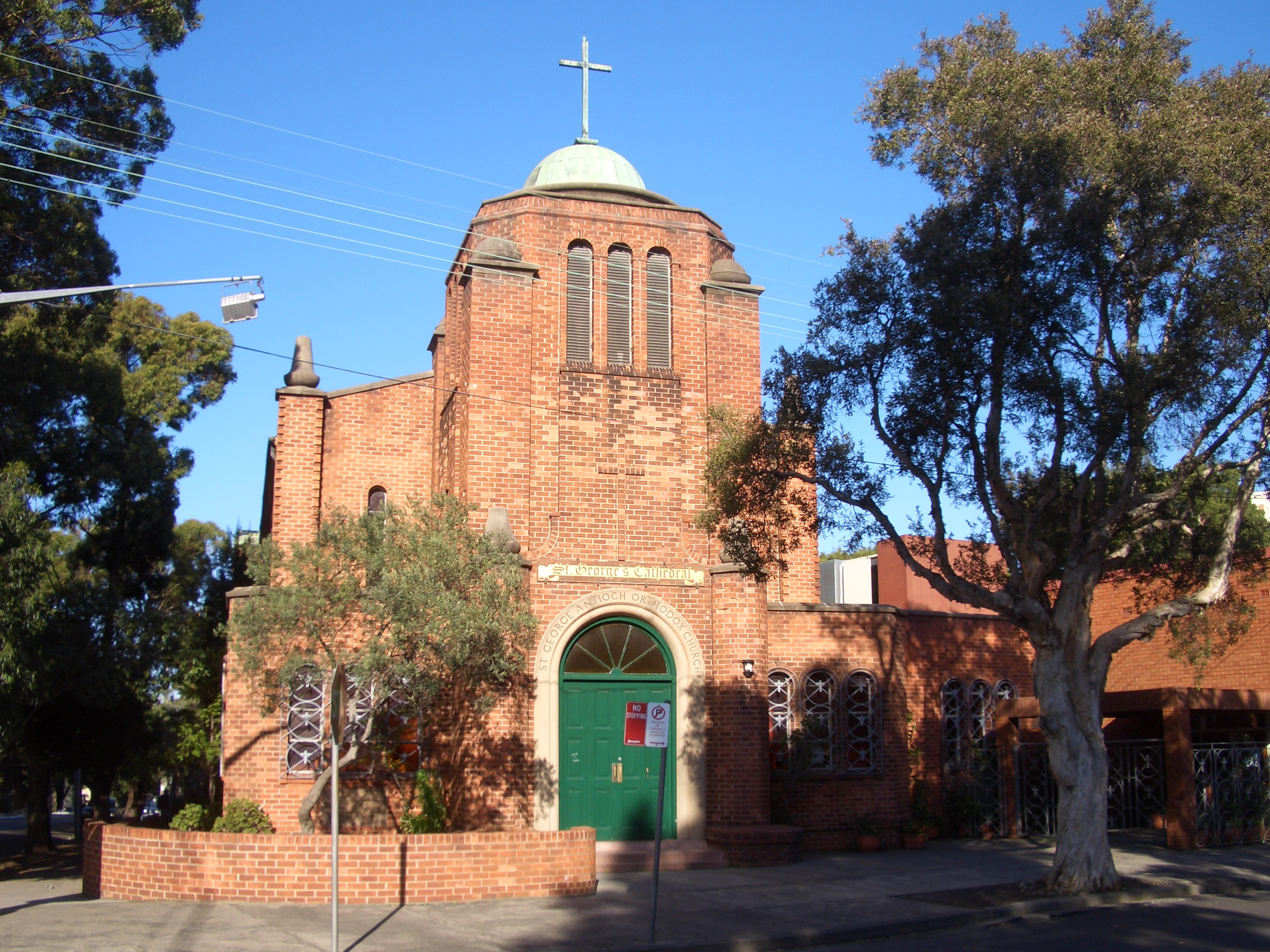 St George Antioch Orthodox Church, Redfern, Sydney